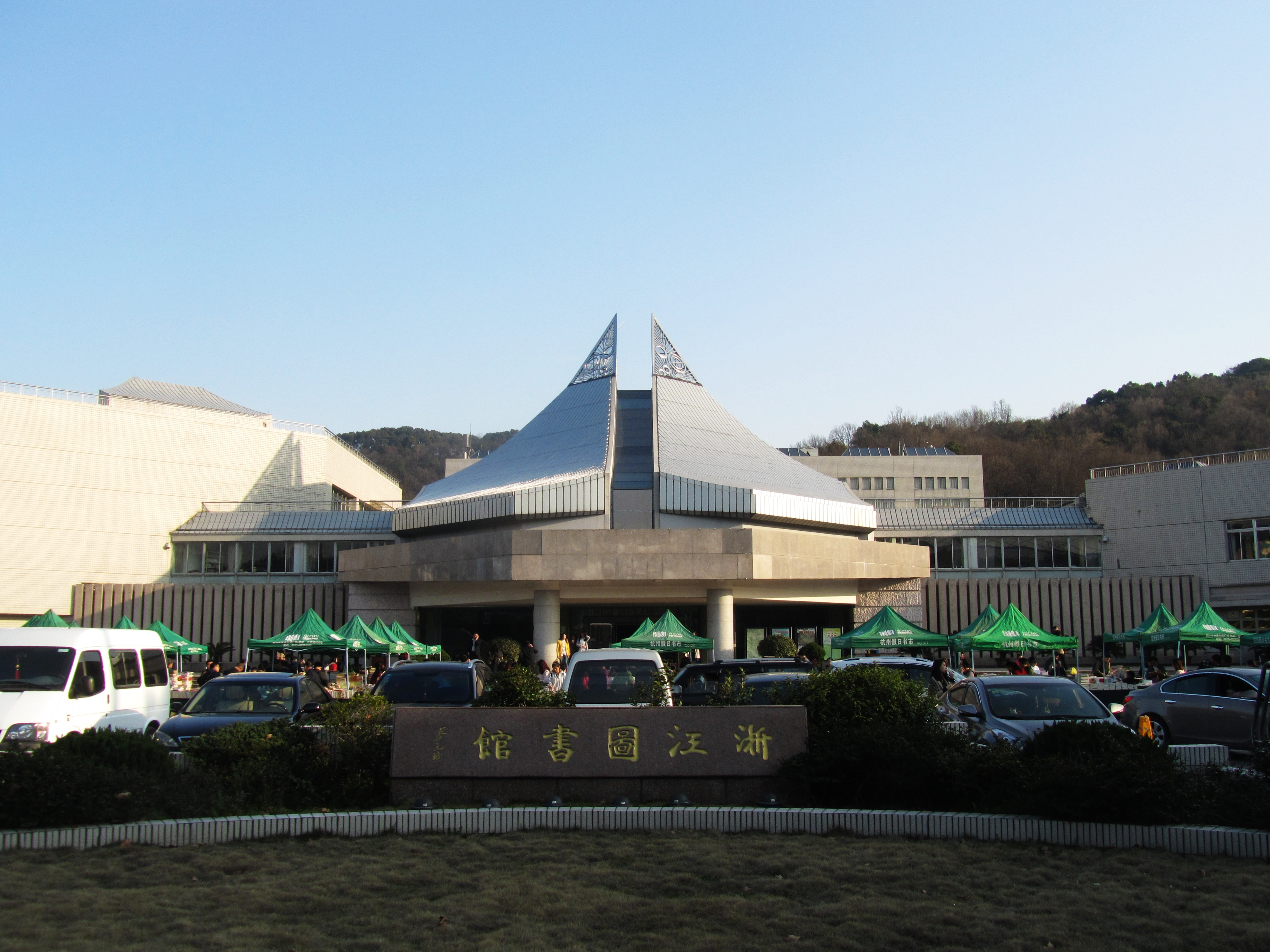 浙江图书馆曙光路总馆，北侧。